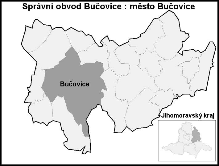 Hranice Bučovice (Vyškov-(Bučovice)- czech republic)